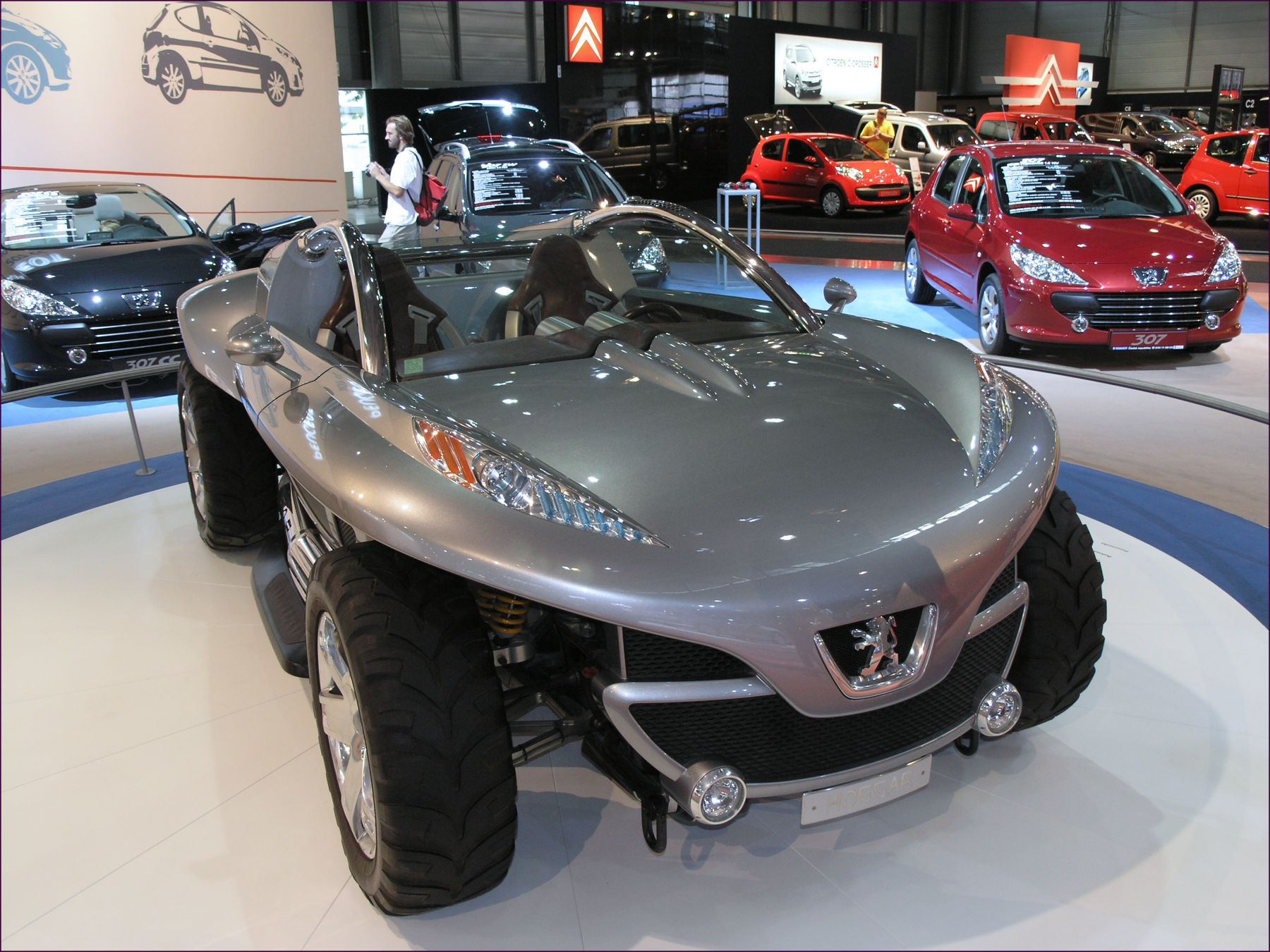 Peugeot Hoggar